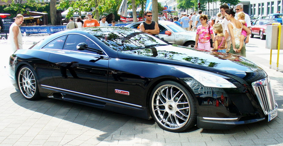 Einzelstück Maybach Exelero - ein Sportcoupé auf Basis Maybach 57 S - Zwölfzylindermotor mit Biturbo-Aufladung auf knapp sechs Liter Hubraum aufgebohrt, so dass eine Leistung von 700 PS (515 kW) und ein Drehmoment von 1020 Newtonmeter entwickelt wird.